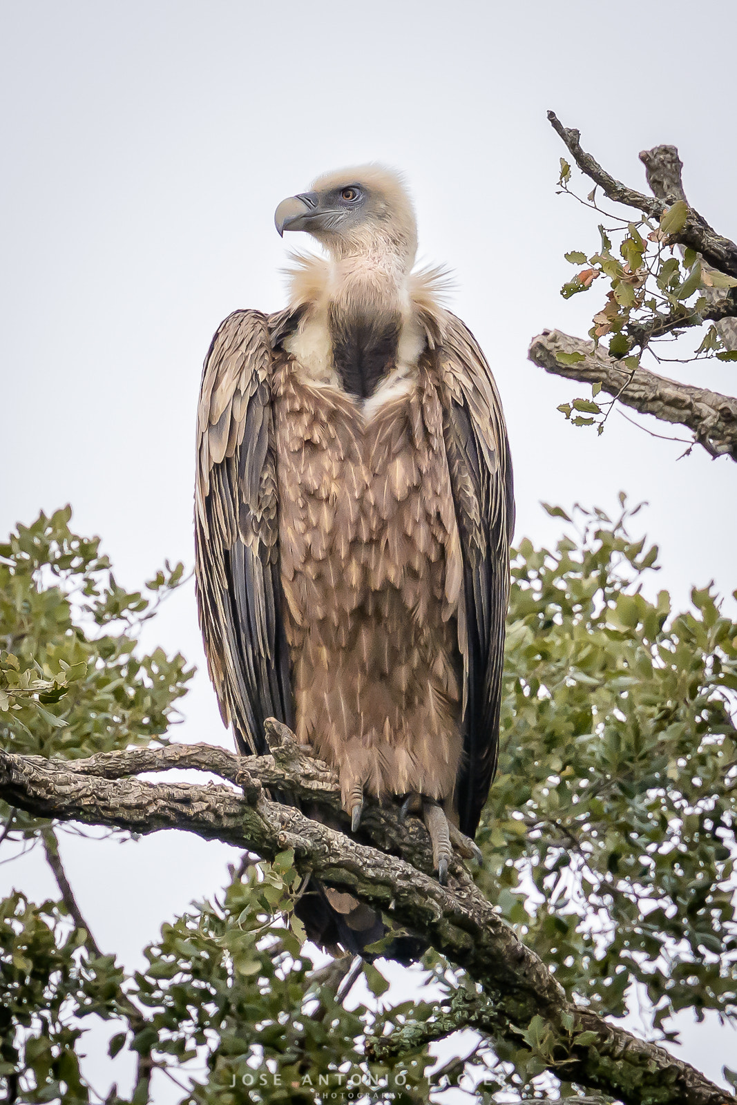 500px provided description: Buitre Leonado [#Cortes de la Frontera ,#Aves ,#Fauna ,#Buitre Leonado]